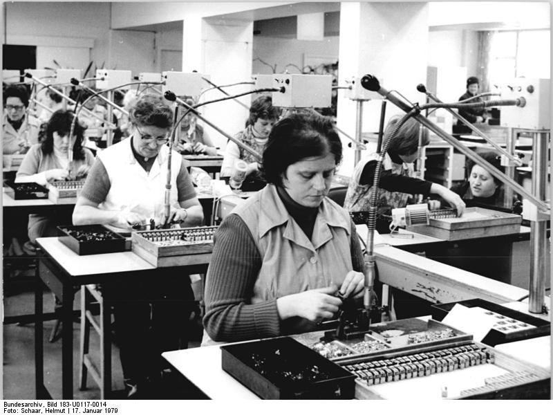 VEB Relaistechnik Großbreitenbach, Brigade "Fidel Castro" ADN-ZB Schaar 17.1.79 Bez. Suhl: Die Qualität der Erzeugnisse ständig weiter zu verbessern, ist auch in diesem Jahr einer der Wettbewerbsschwerpunkt im VEB Relaistechnik Großbreitenbach, Kreis Ilmenau. Besondere Anstrengungen dazu wollen auch die Frauen der Brigade "Fidel Castro" hier in der Relais-Montage unternehmen. Bereits Ende 1978 konnte das Werk, das wichtiger Zulieferer für die Schwachstromtechnik, die Konsumgüterindustrie sowie für den Maschinen- und Anlagenbau ist, als "Betrieb der ausgezeichneten Qualitätsarbeit" geehrt werden. - siehe auch U 0117-15 N